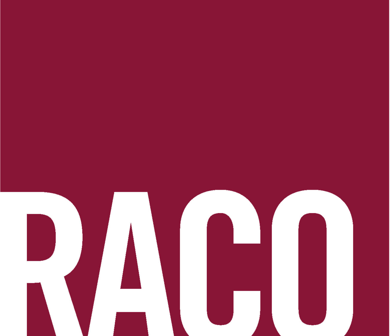 Logotip de Revistes Catalanes amb Accés Obert